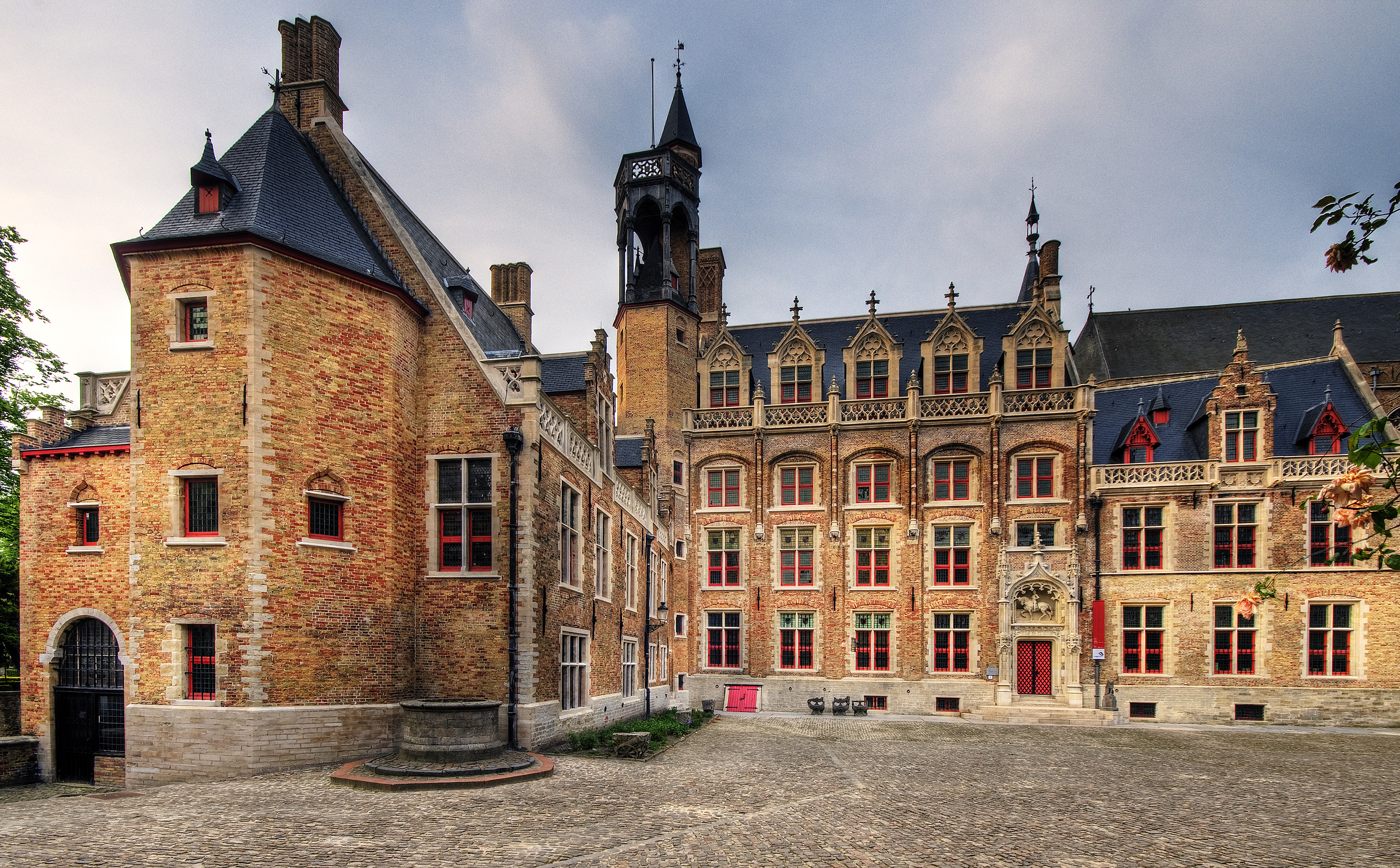 Gruuthusemuseum in Brugge